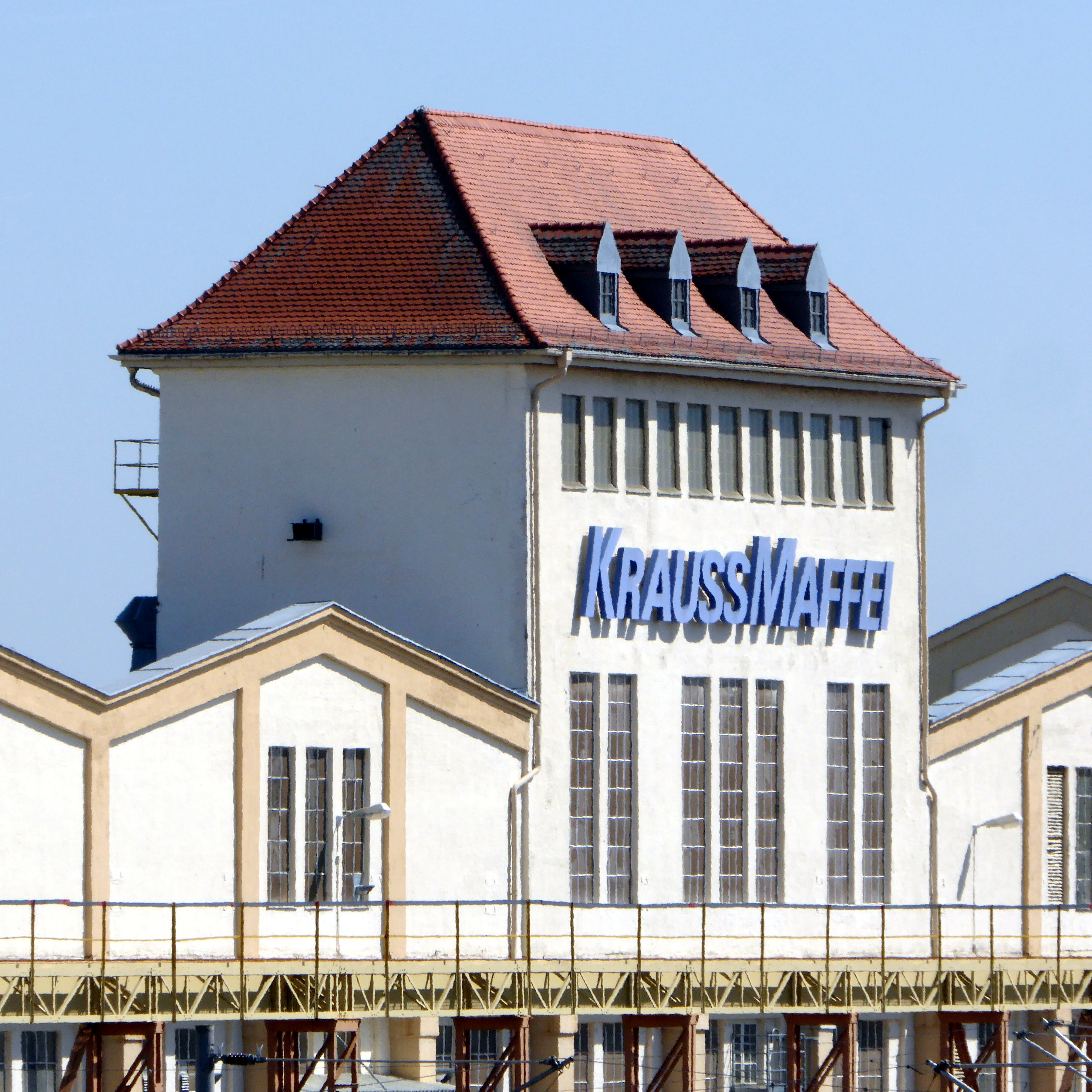 Gebäude von Krauss-Maffei in München-Allach.